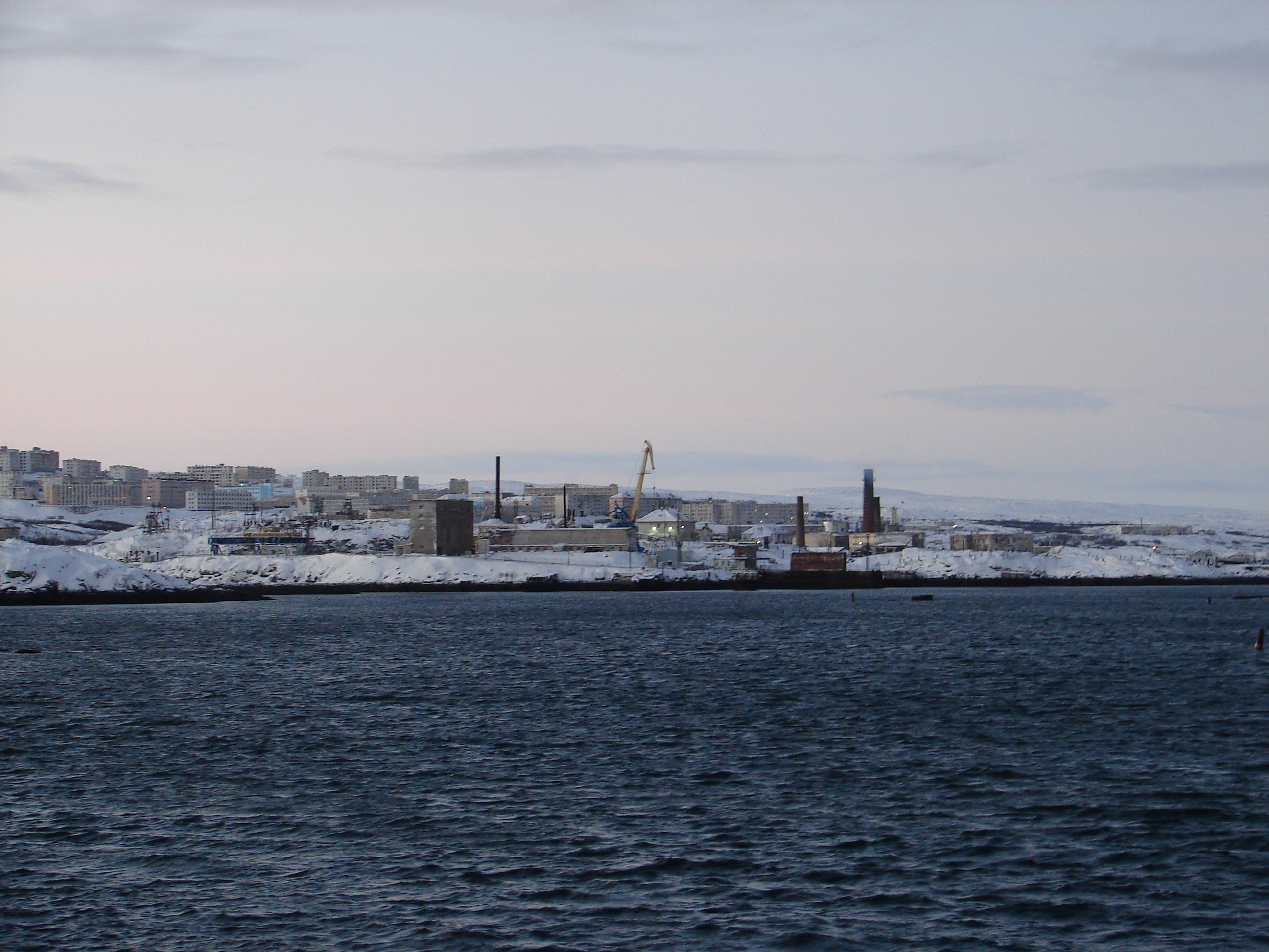 Островной